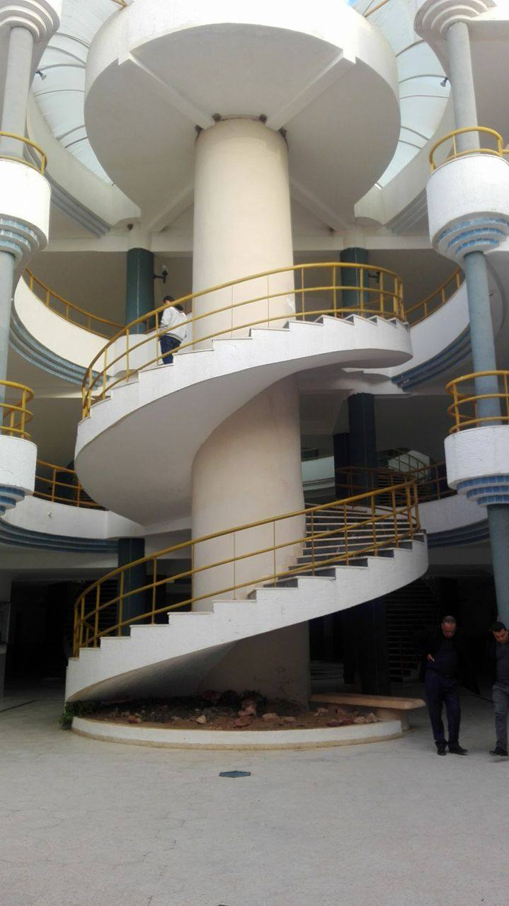 Institut supérieur de documentation de Tunis